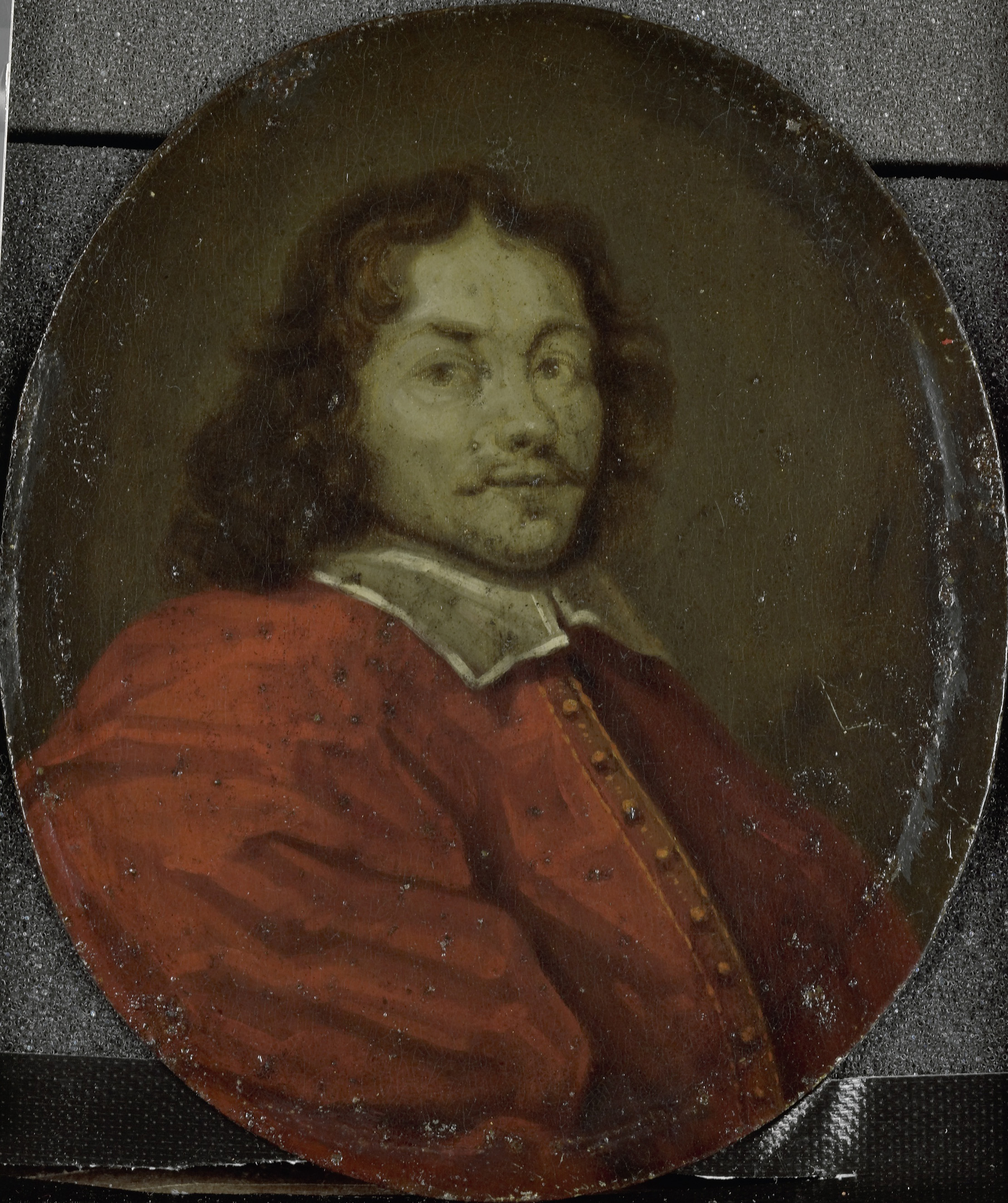 Portret van Matthijs Gansneb, genaamd Tengnagel (1613-voor 1657). Dichter te Amsterdam. Buste in ovaal, naar rechts. Vervaardigd naar een onbekend voorbeeld. Onderdeel van een verzameling portretten van Nederlandse dichters. Collection: schilderijen; Panpoeticon Batavum